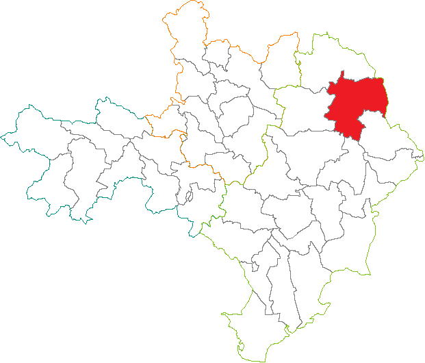 Situation du canton dans le département du Gard (France)